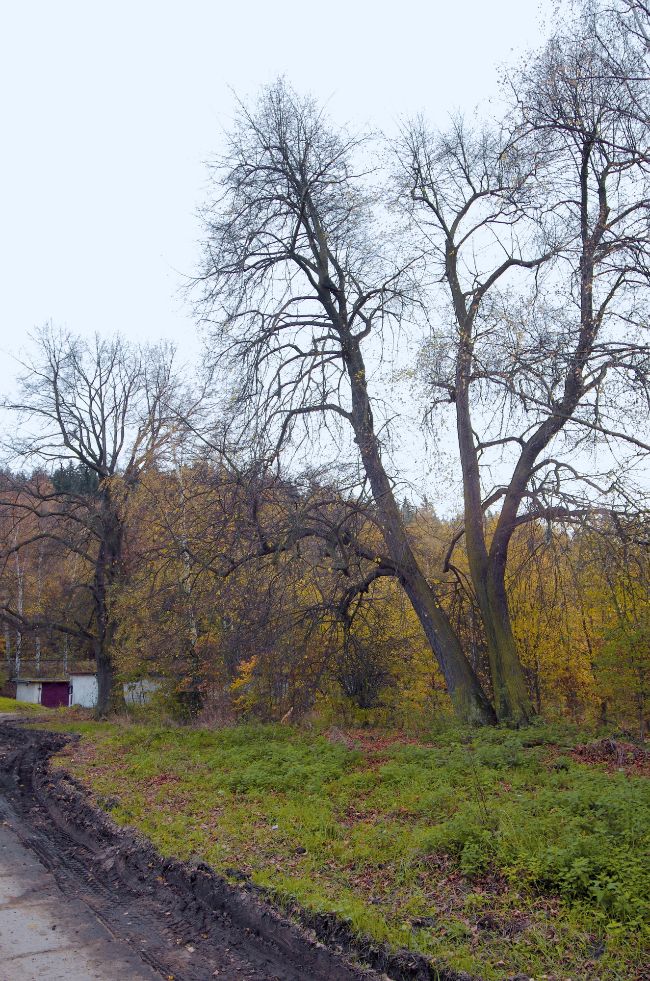 Památné stromy Tuhnické lípy, Tuhnice, okres Karlovy Vary